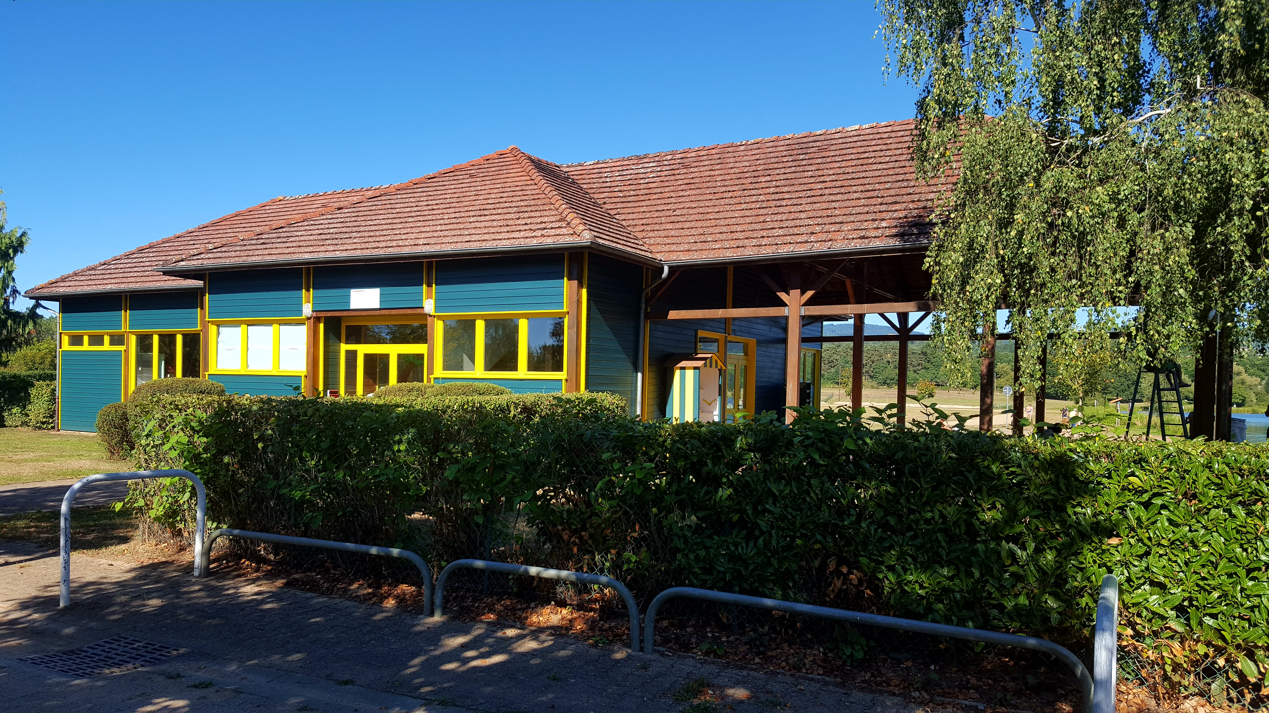 ILOA, Les Rives de Thiers